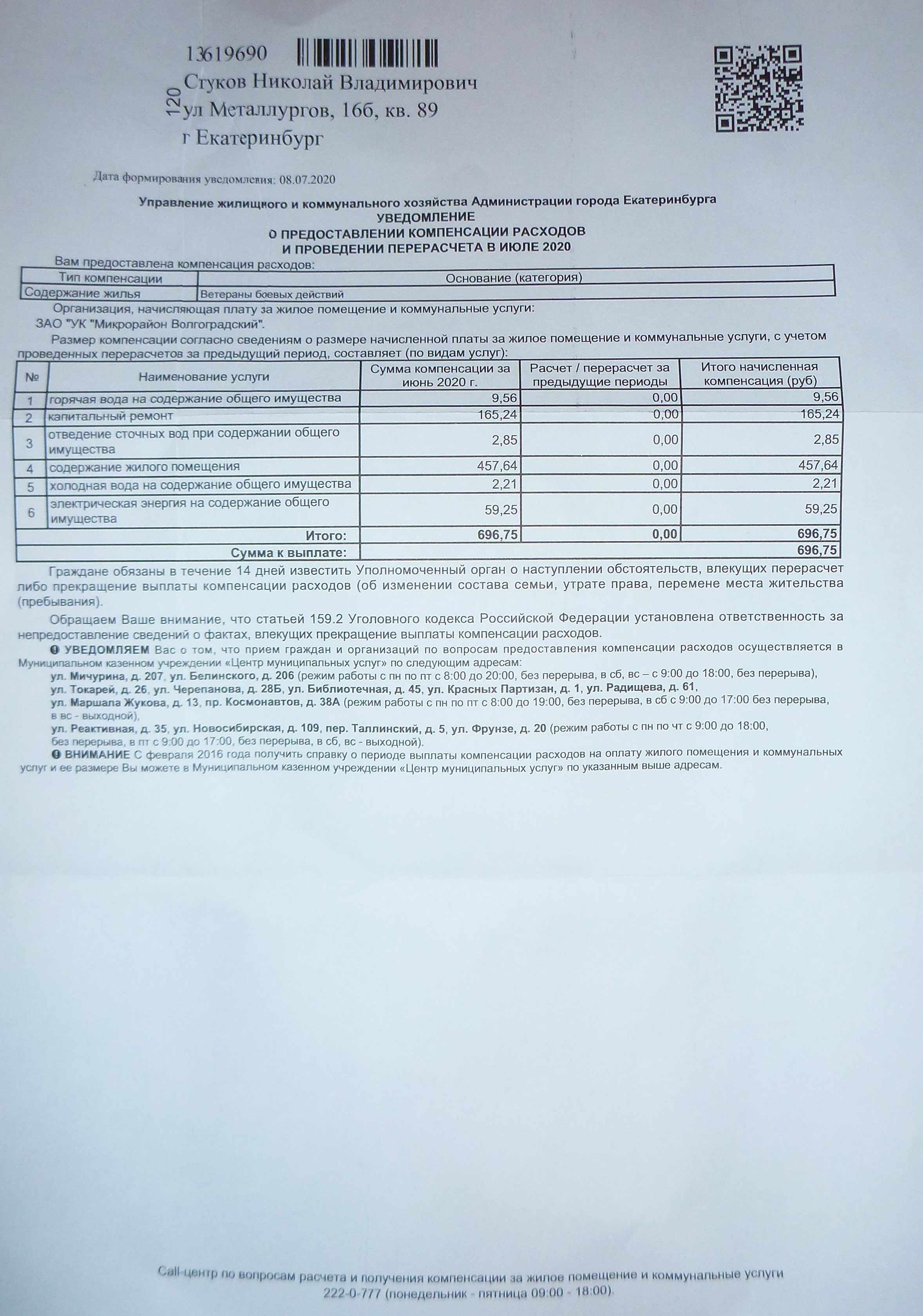 Уведомление льготнику ветерану боевых действий Екатеринбурга о размере компенсации ему за ЖКХ за июнь 2020 года. Выдано Управлением жилищного и коммунального хозяйства Администрации города Екатеринбурга 8 июля 2020 года